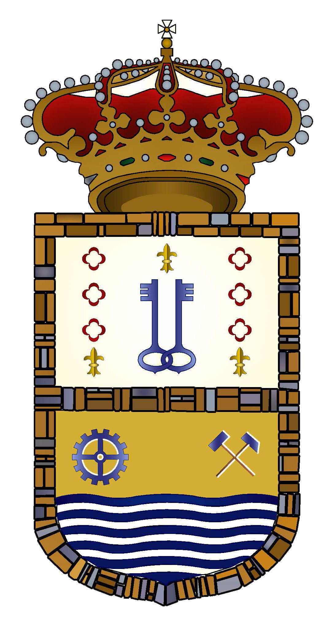 Escudo en uso de forma oficial por el Ilmo. Ayuntamiento de Mieres (Asturias), con las características aprobadas en Pleno Municipal del 13 de abril de 1965.